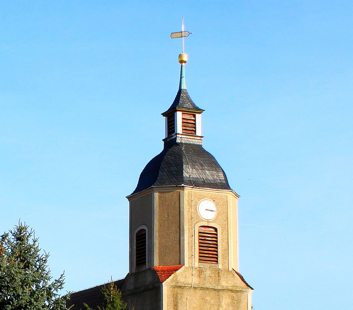 Kosilenzien